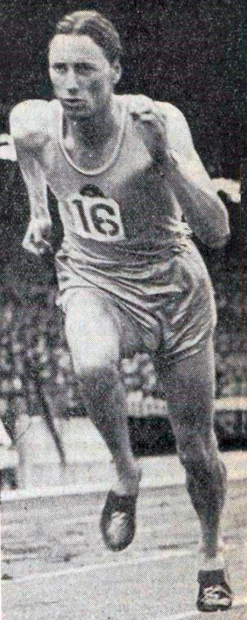 Robert Chef d’Hôtel, Champion d'Europe 1946 du relais 4x400m, ici en juin 1946.